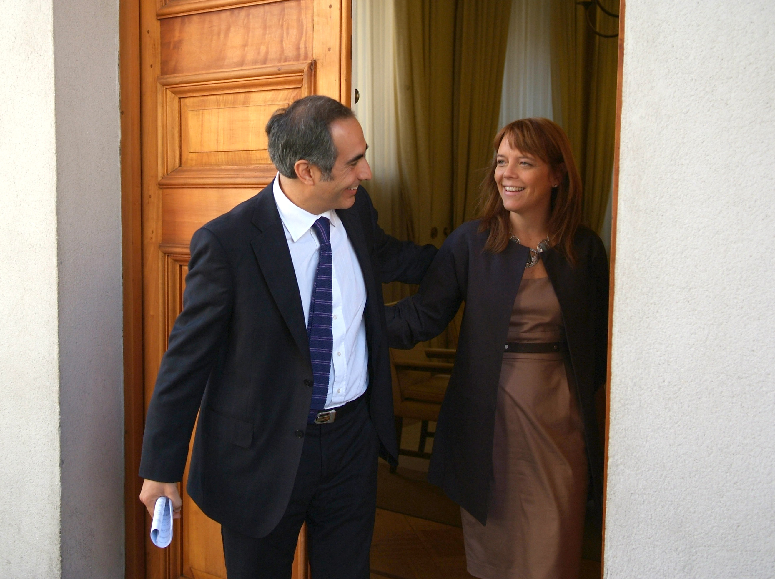 Ministra Secretaria General de Gobierno,Ena von Baer junto al Senador,Francisco Chahuán.Palacio de La Moneda.